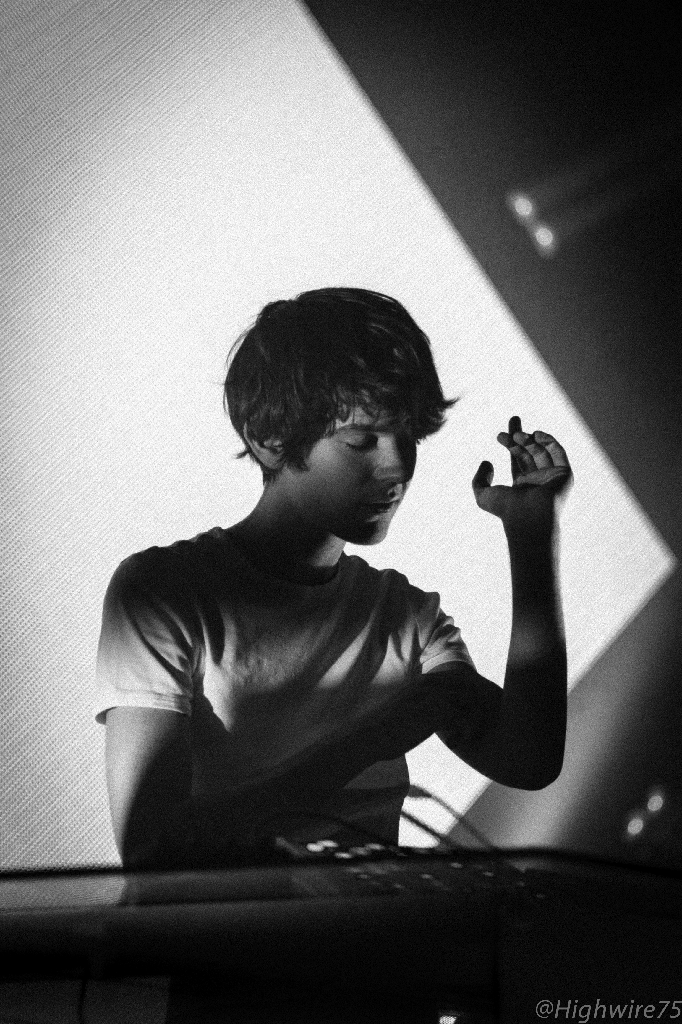 Madeon, Brussels Live, 04 april 2015